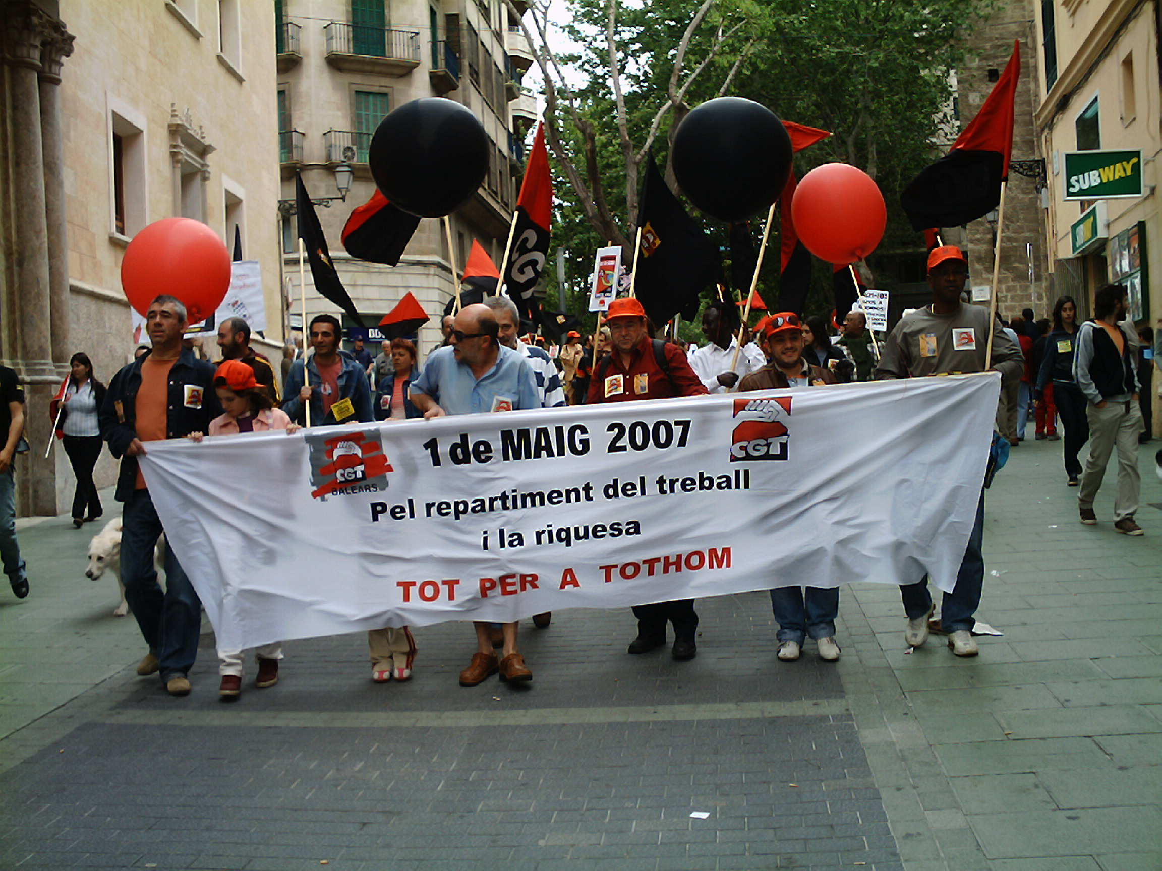 Manifestació del 1er de maig de 2007, Palma (Mallorca).